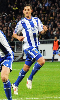 Philip Haglund